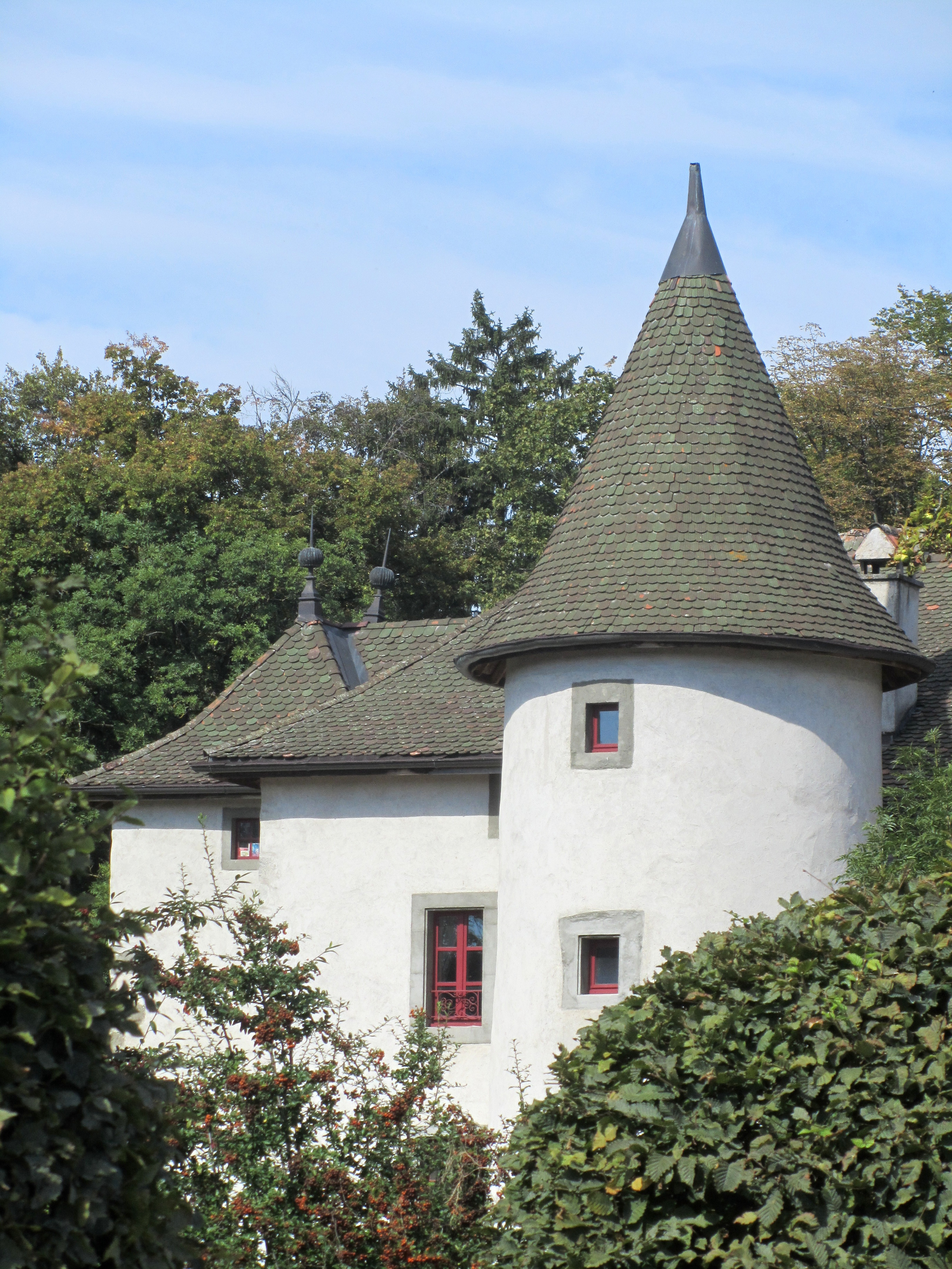 la Maison forte de Loëx, près de Bonne (Haute-Savoie)